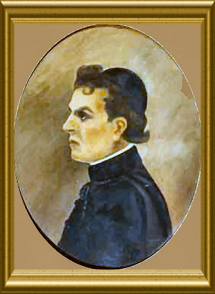 Oleo sobre tela de autor anónimo expuesto en el Museo de La Casa de la Inependencia en San Miguel de Tucumán, Argentina.